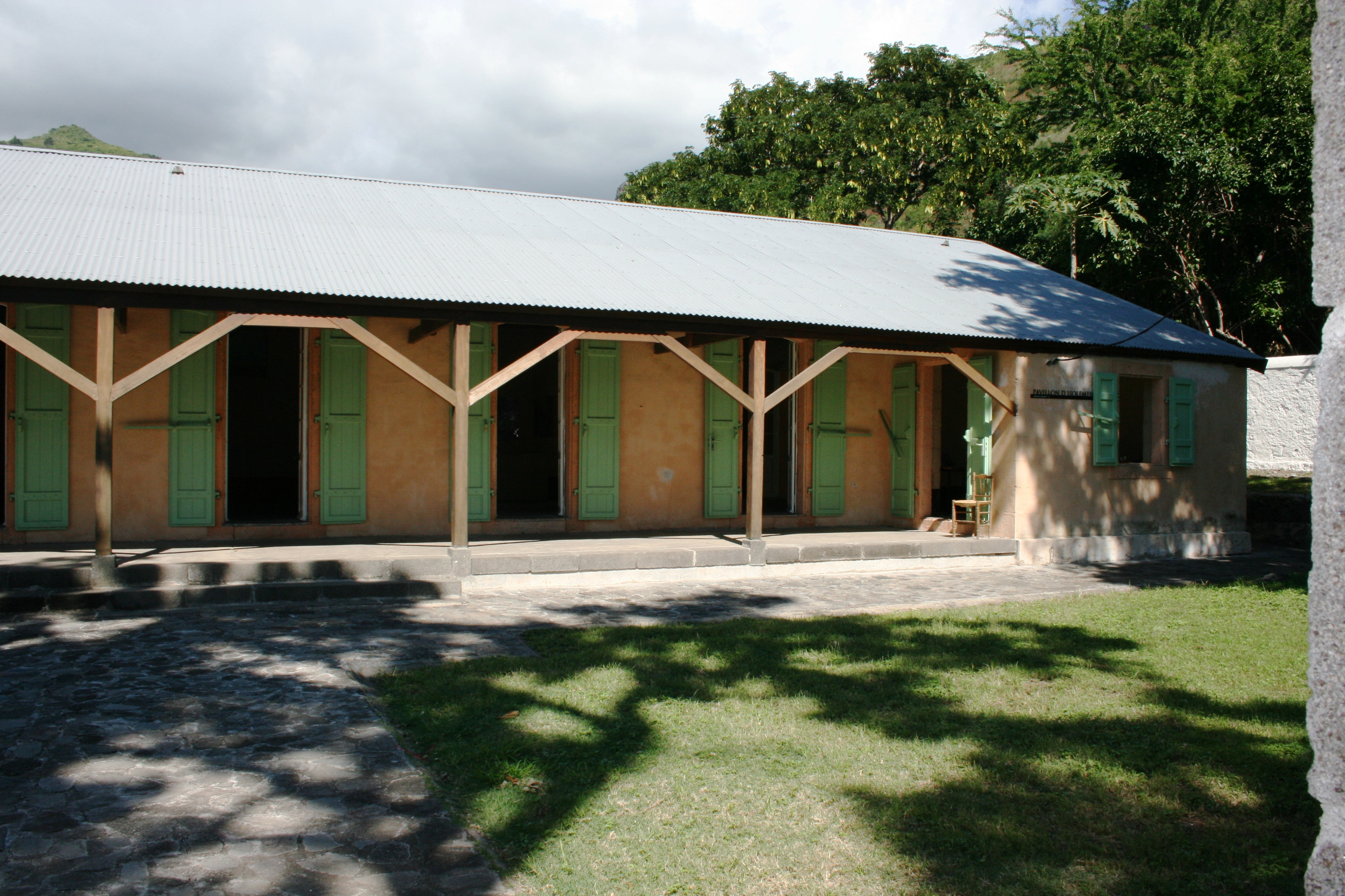 Vue du quartier d'isolement du premier des lazarets de la Grande Chaloupe, à La Réunion.